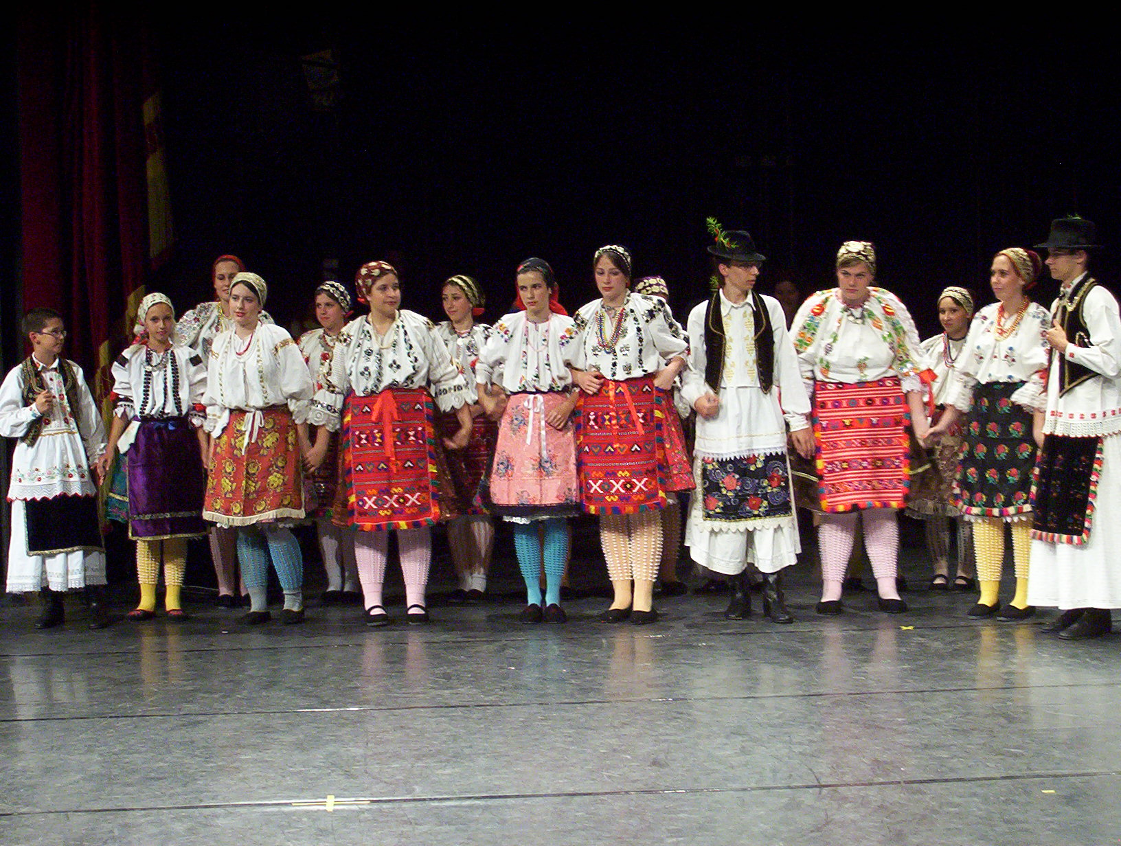 Baranyai bosnyákok Zágrábban